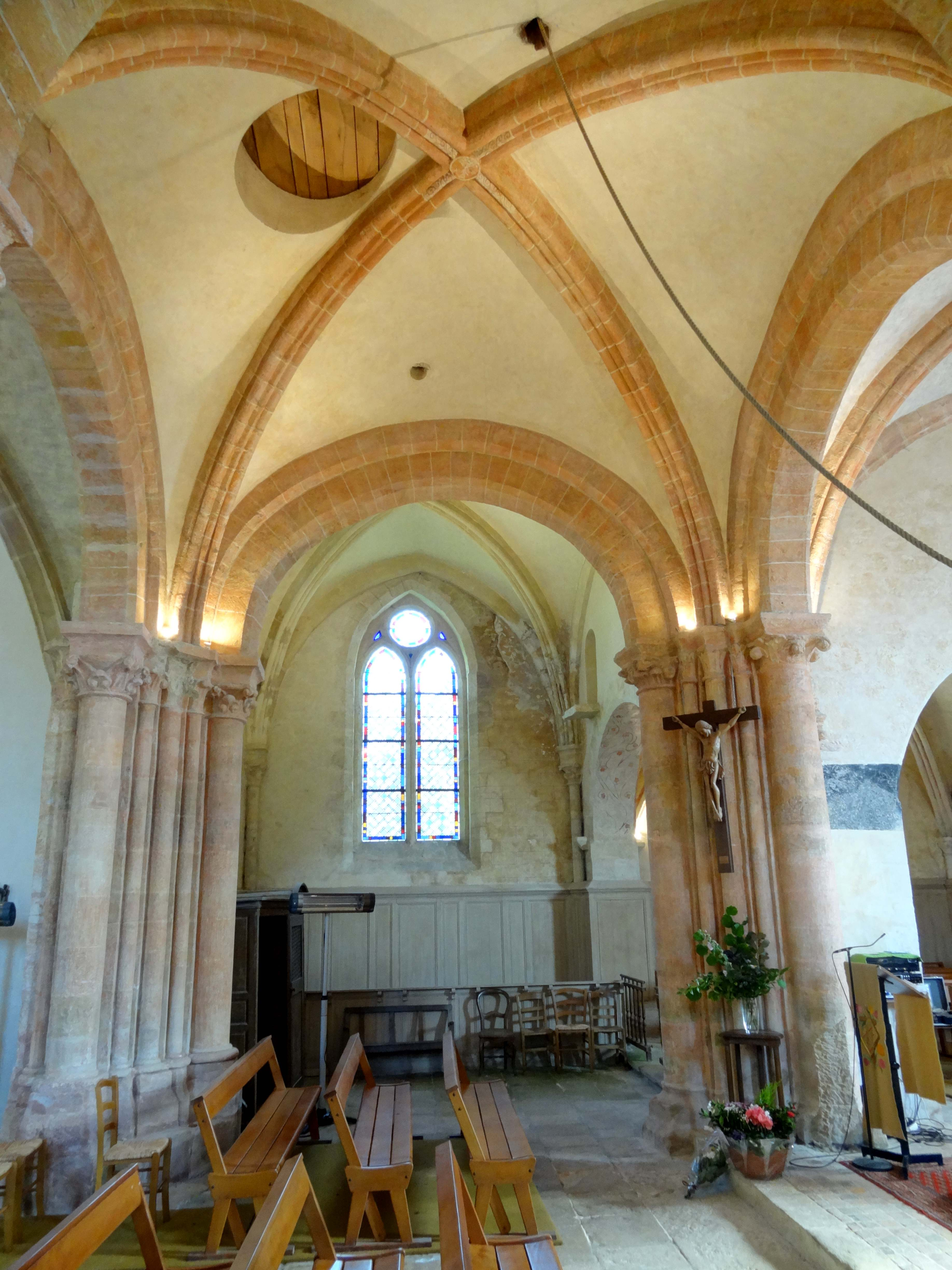 Intérieur de l'église - voir titre.